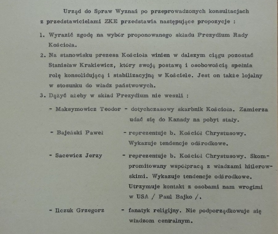 Fragment notatka pracownika UdSW (prawdopodobnie dyr. T. Dusik) przesłana do dyr. Skarżyńskiego z Wydziału Administracyjnego KC PZPR oraz do Departamentu IV MSW na temat zbliżającego się VI Synodu ZKE w grudniu 1968. 18 listopad 1968. AAN UdSW 131/482.